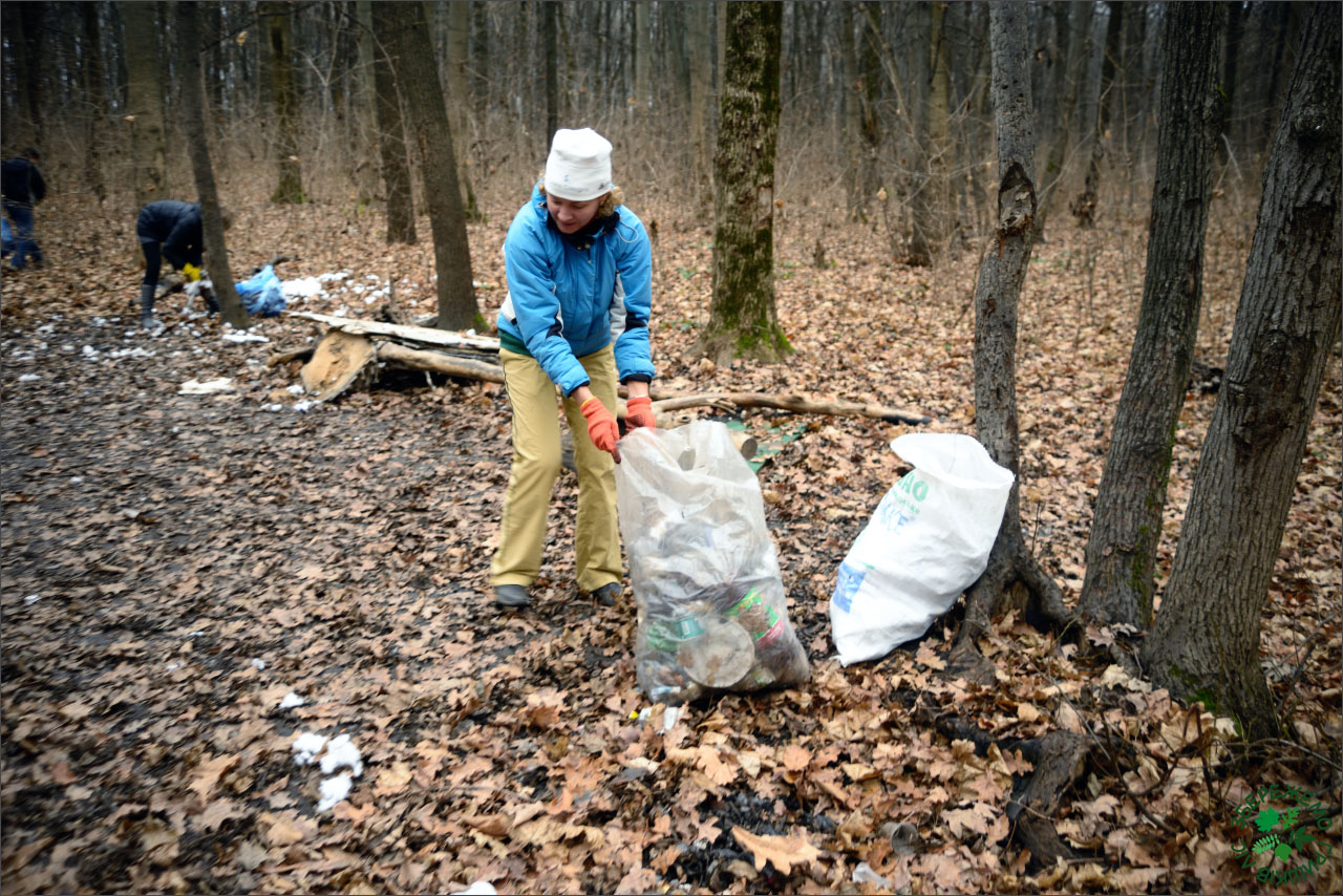 Екологічна акція "Приберемо Гришків ліс", 16.11.2013